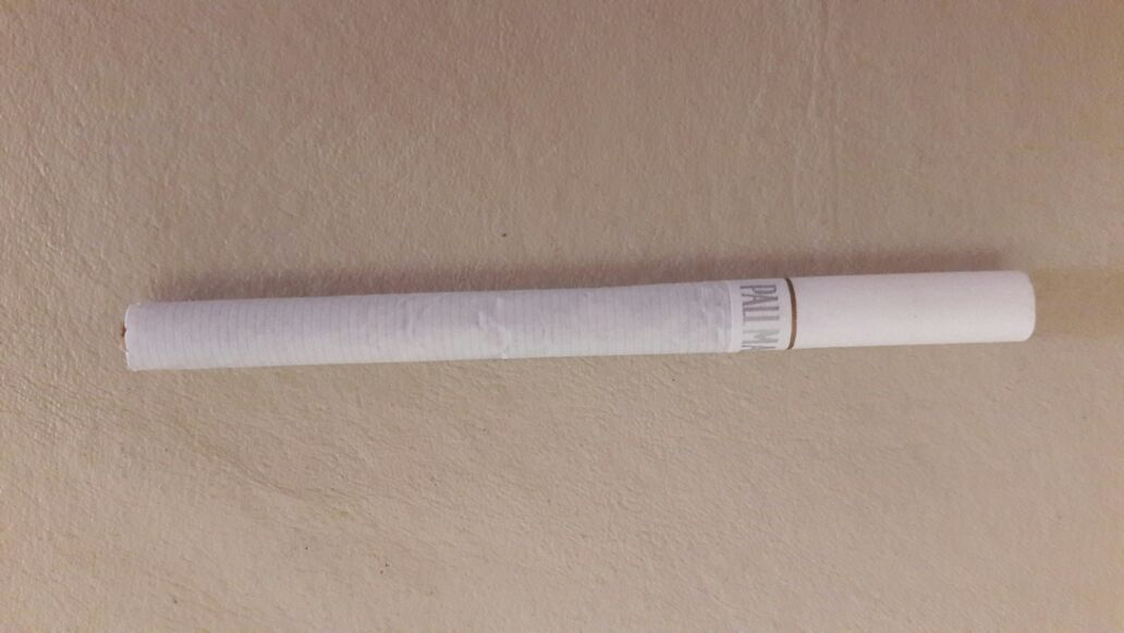 Cigarrillo